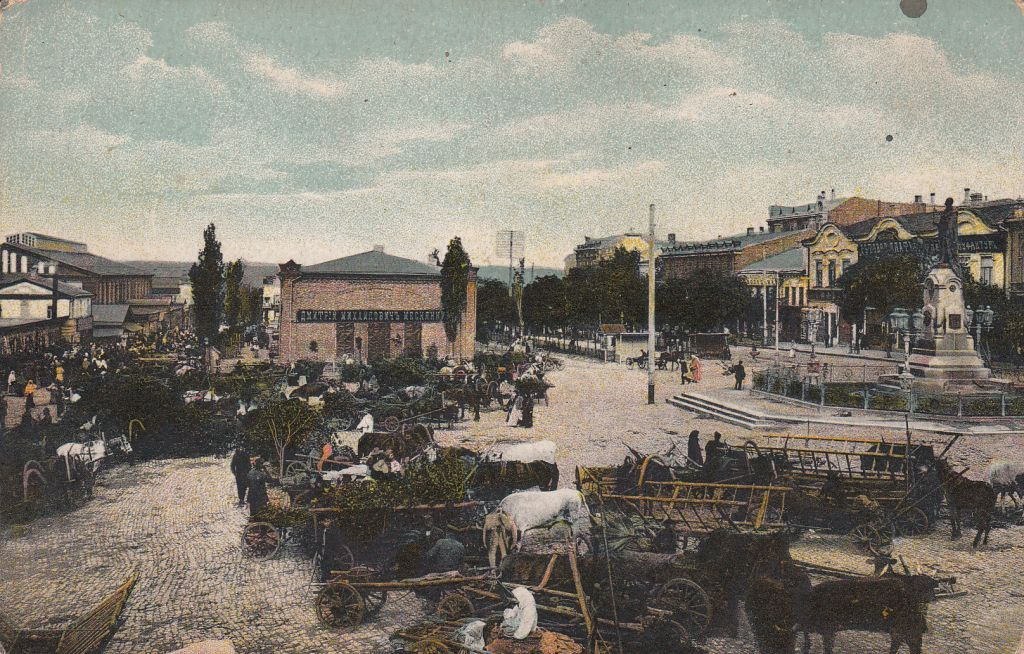 Ростов-на-Дону Соборная площадь, базар (справа - памятник Александру II)